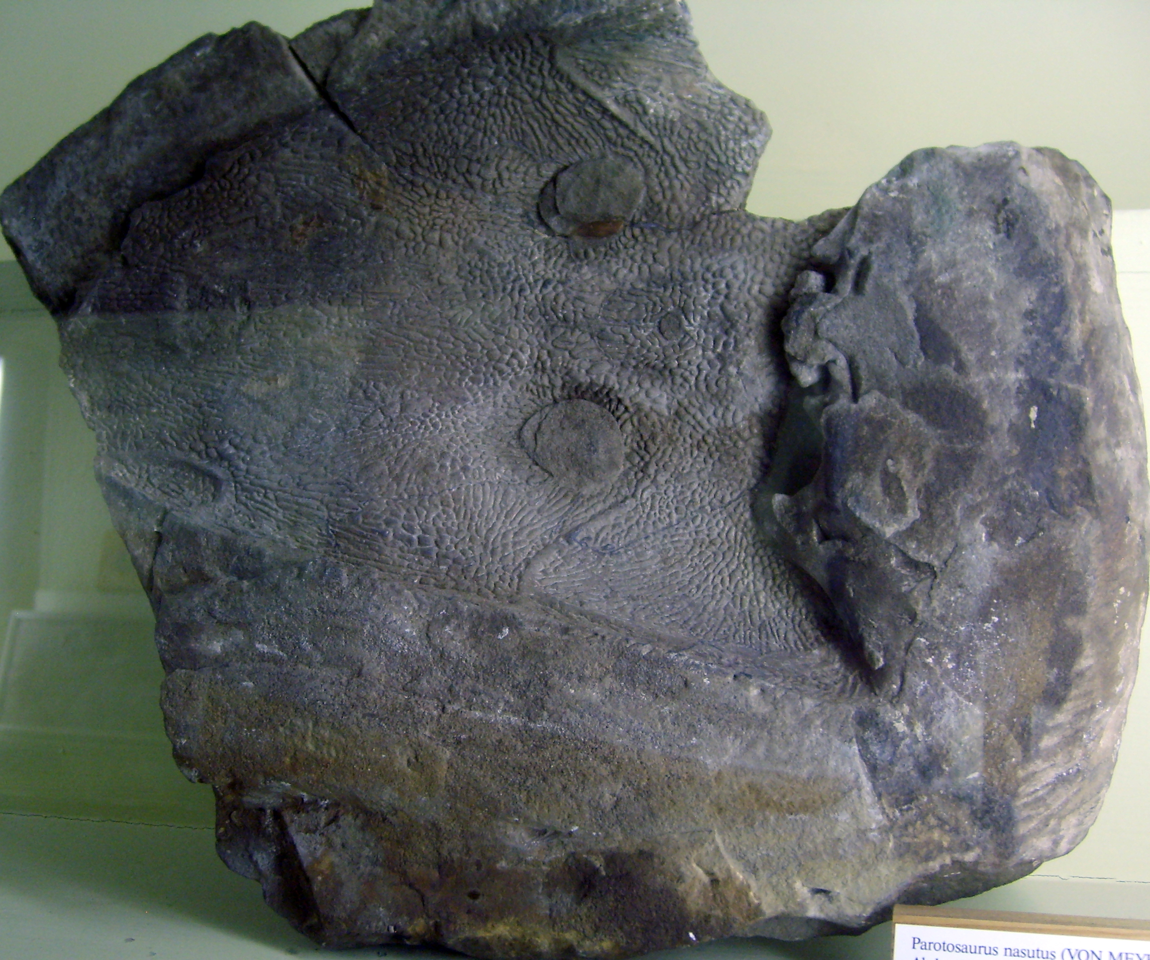 Parotosaurus (=Parotosuchus) nasutus skull impression at the Museum für Naturkunde, Berlin